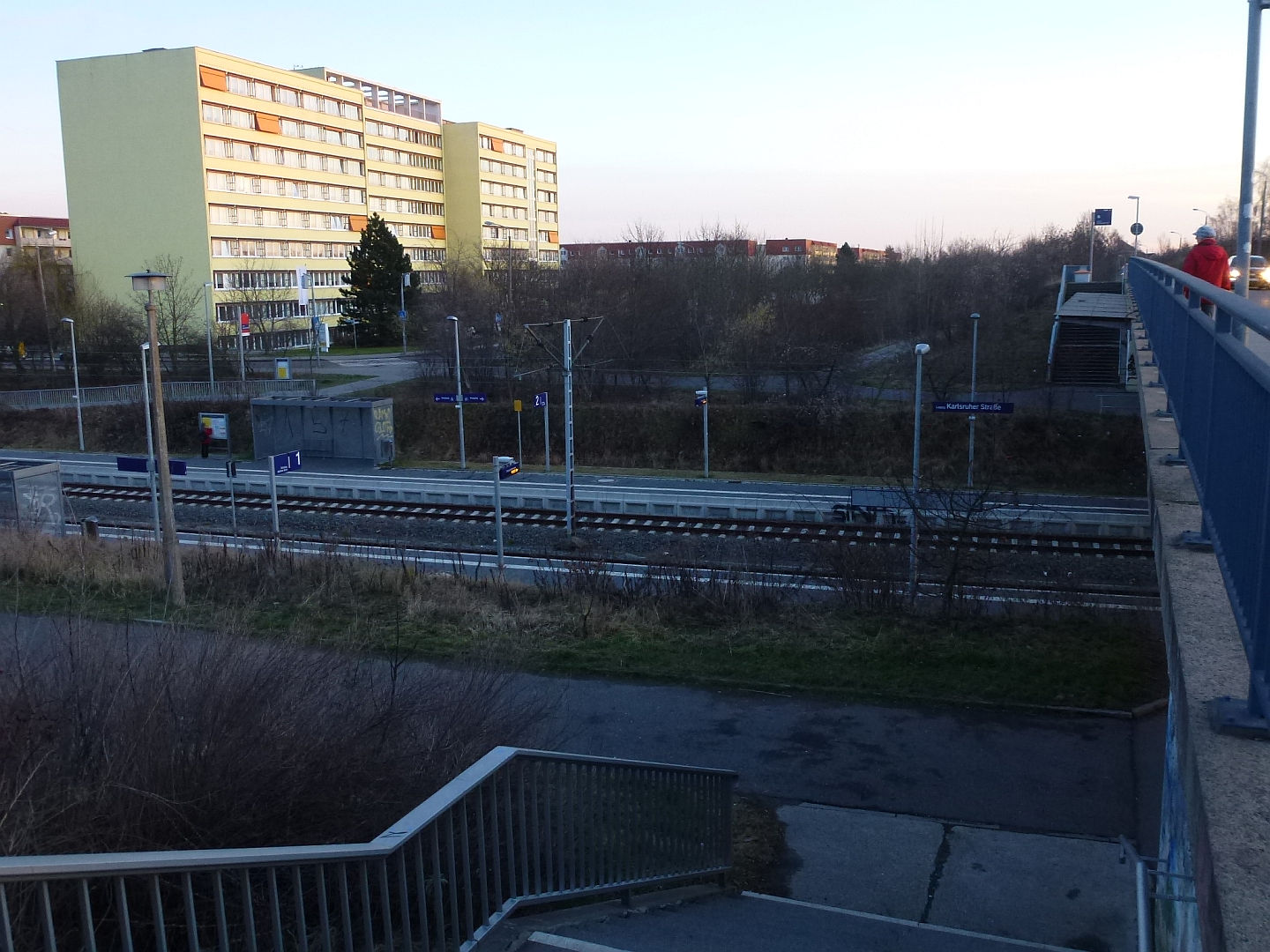 Haltepunkt Karlsruher Straße in Leipzig, im Hintergrund Seniorenheim der Marseille-Kliniken